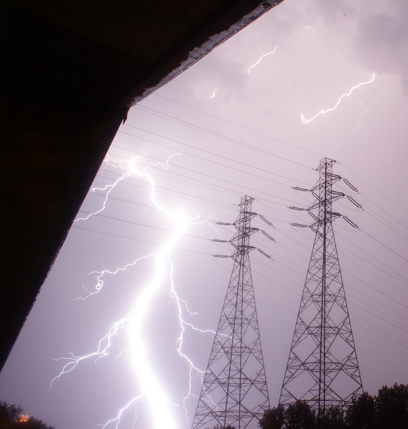 Praca własna osoby przesyłającej